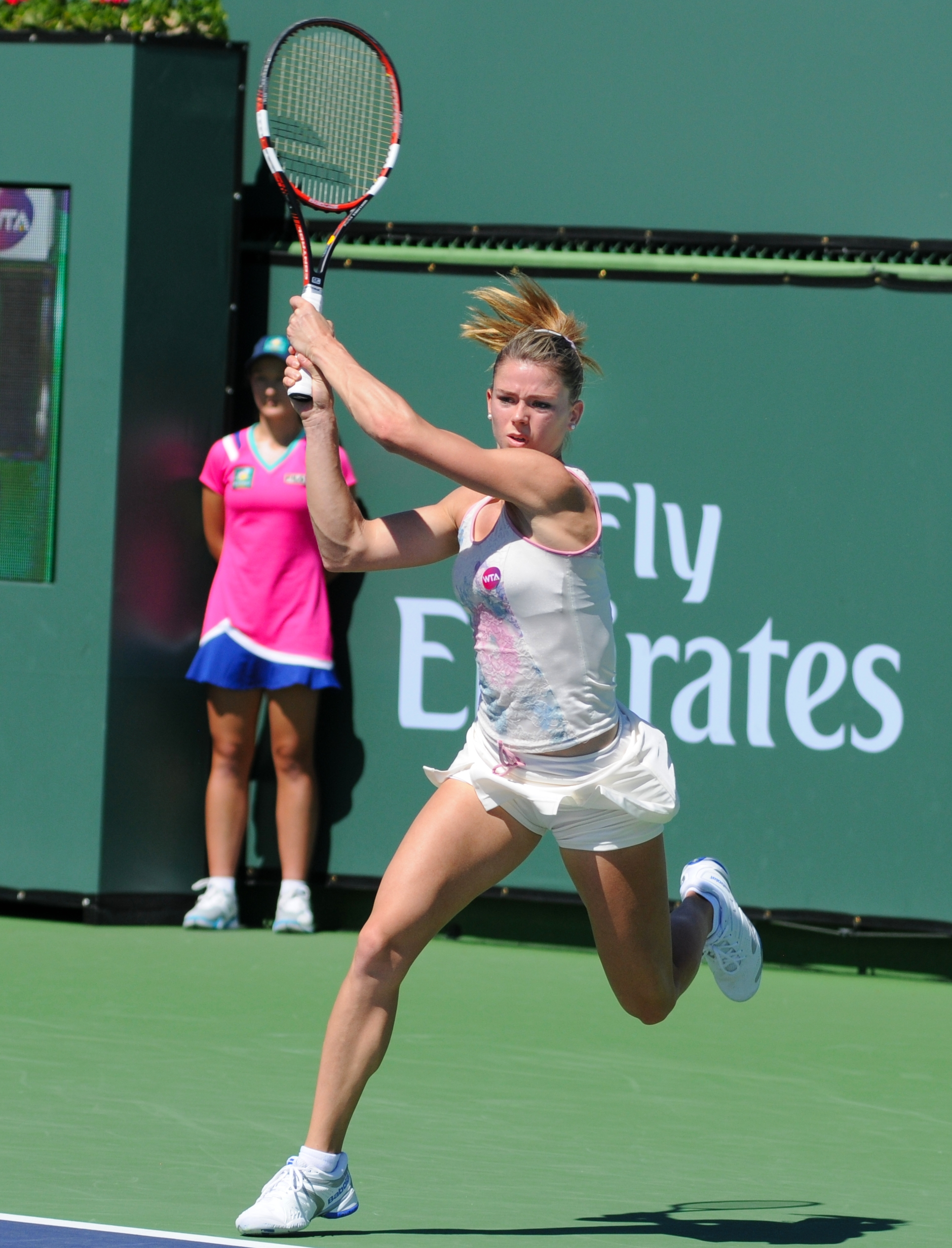 2015 BNP Paribas Open